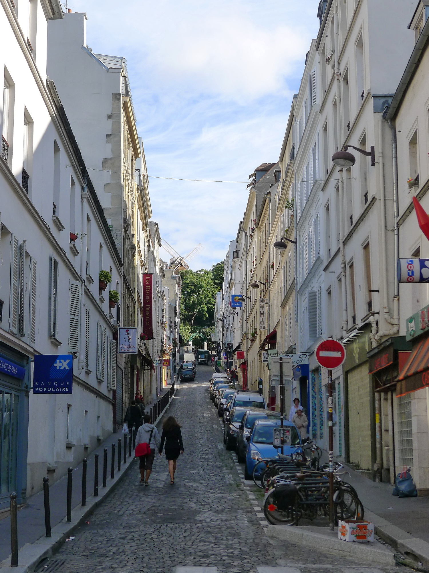 Rue Tholozé - Paris XVIII